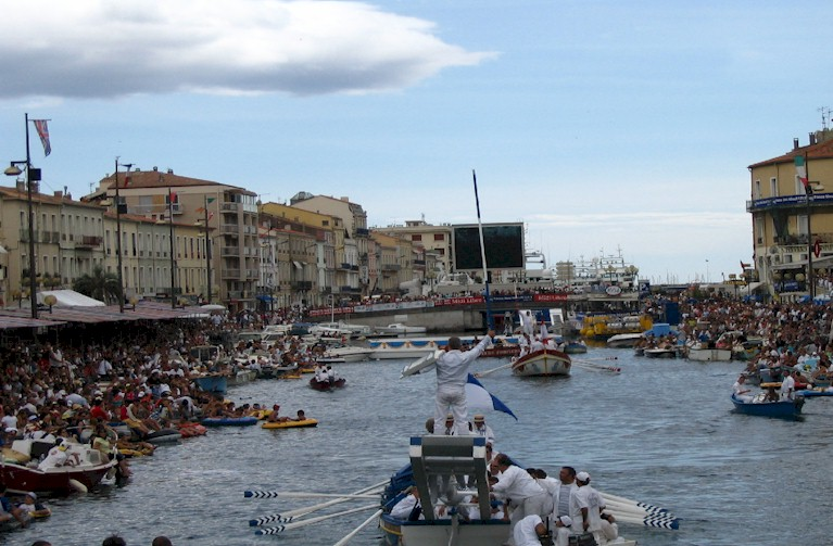 photo perso des joutes nautiques de la Fête de la Saint-Louis à Sète.